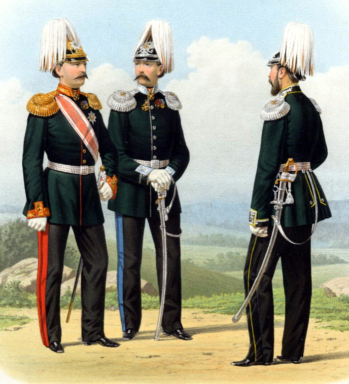 Генерал состоящий по Пехоте и Военно-походные: Шталмейстер и Начальник Императорских Дворцовых телеграфов. (парадная форма) 24 марта 1873.